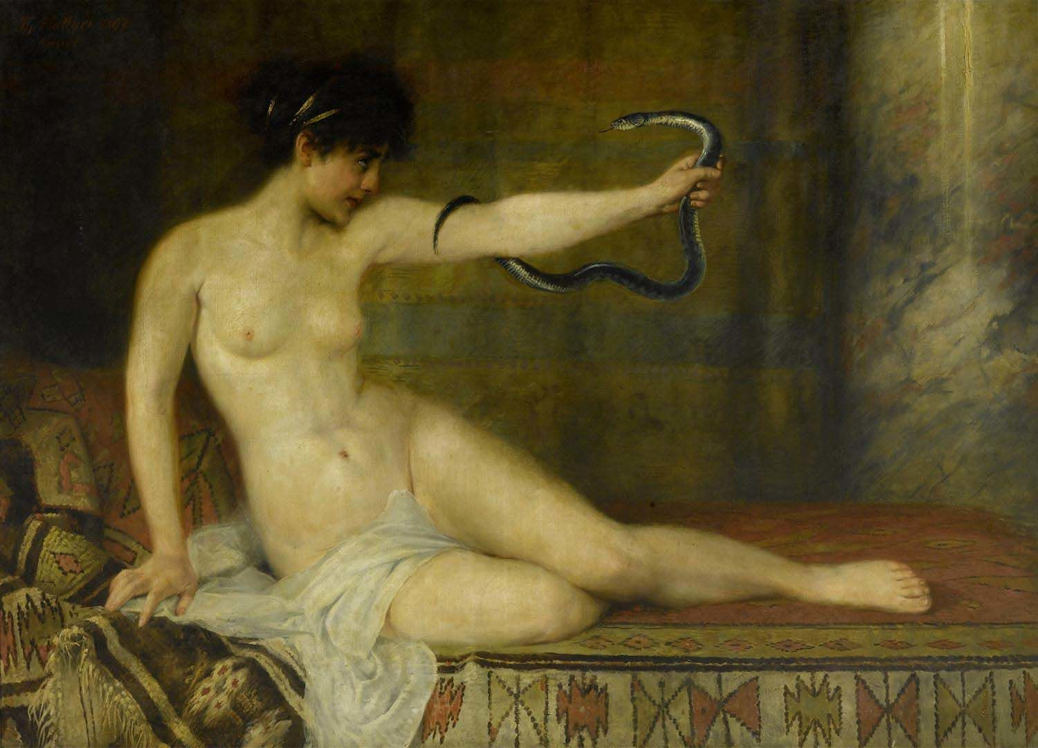 Kleopatra mit der Schlange